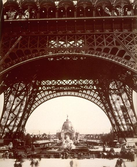 Exposition universelle de 1889 - vue d'ensemble prise sous la Tour Eiffel. ATELIER GOUPIL (?)(1859 -1920). Épreuve sur papier argentique à émulsion. 45,5 x 38 cm.